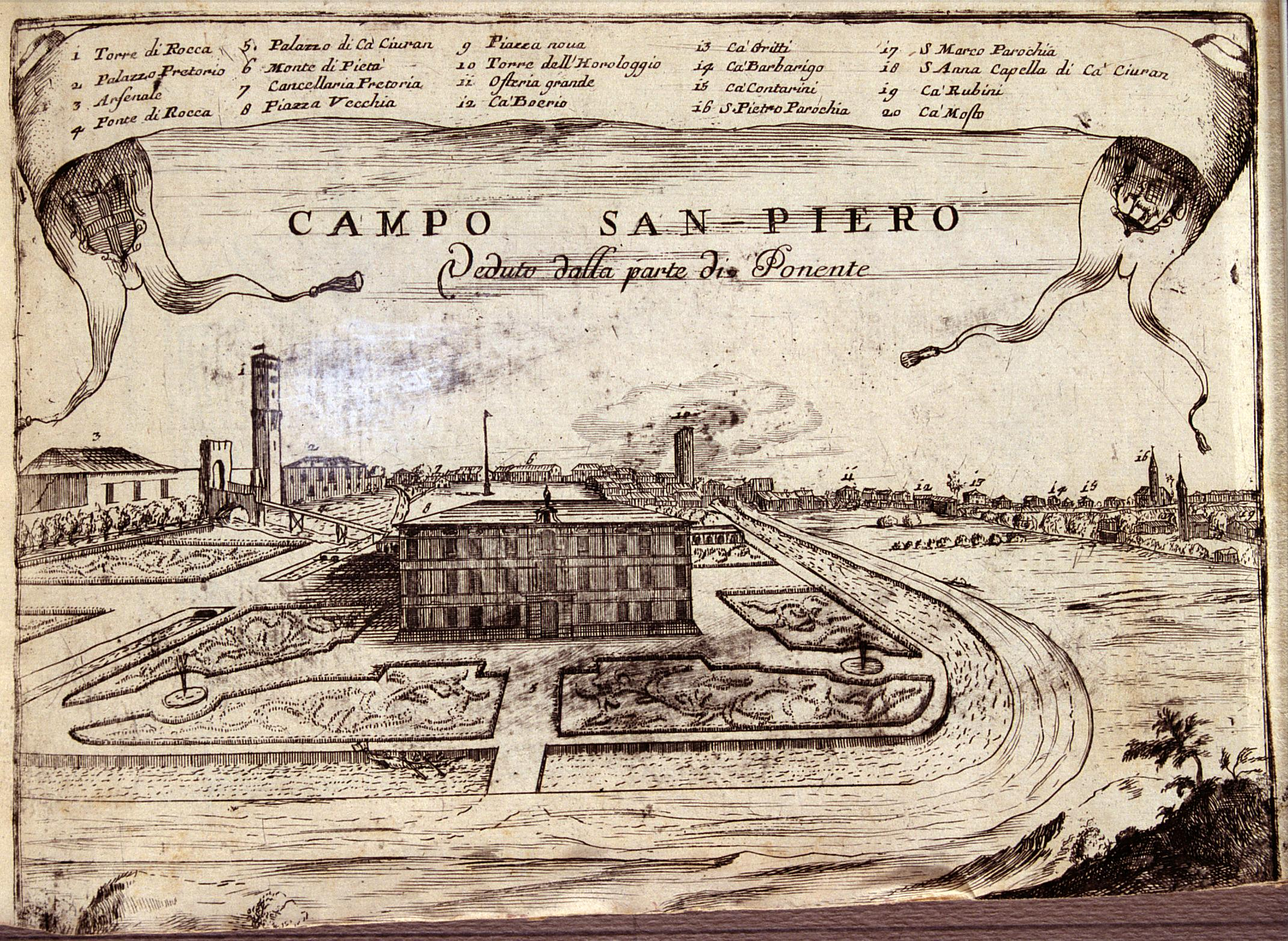 Panorama di Camposampiero, visto da ovest. Litografia di Vincenzo Maria Coronelli, prodotta tra il 1690 ed il 1710. L'immagine è una scansione della II e III di copertina del libro "Camposampiero. Saggi storici" di Don Luigi Rostirola, Ed. Rebellato, ristampa del 1972. La litografia originale è in bianco e nero. Una copia è presente presso l'ufficio del sindaco di Camposampiero sottoforma di quadro.